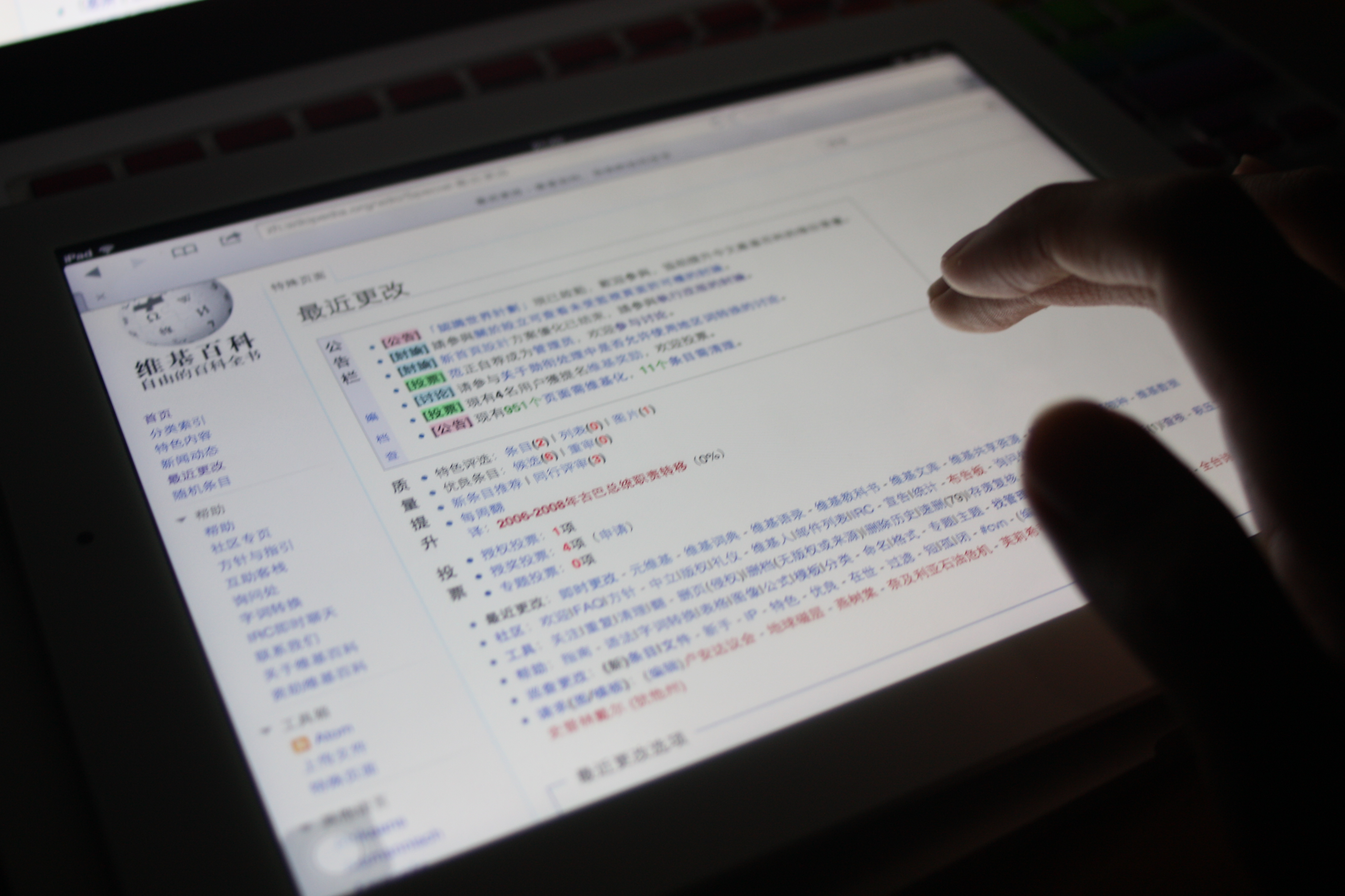 维基百科 最近更改